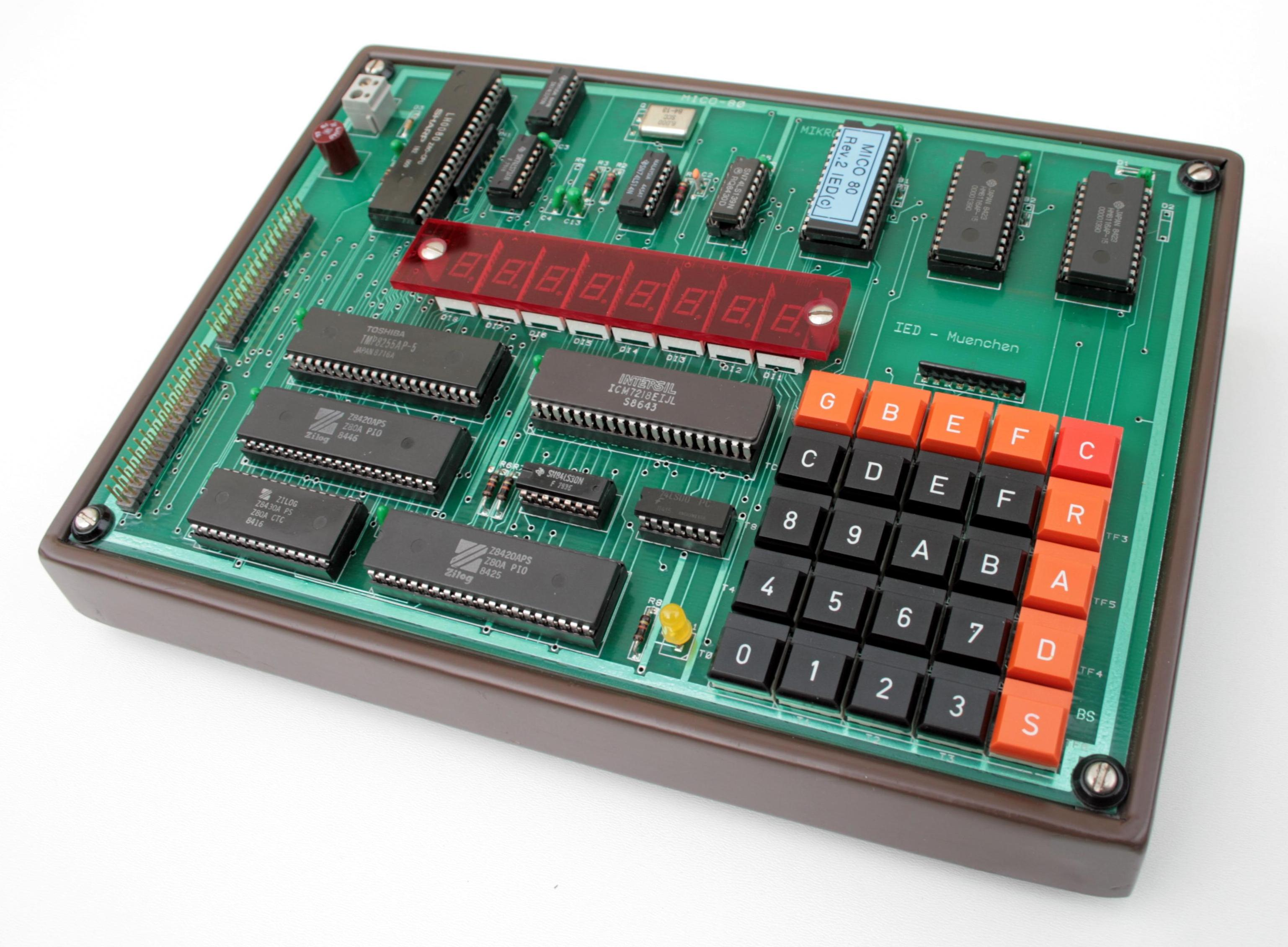 MICO-80 microcomputer in metal body